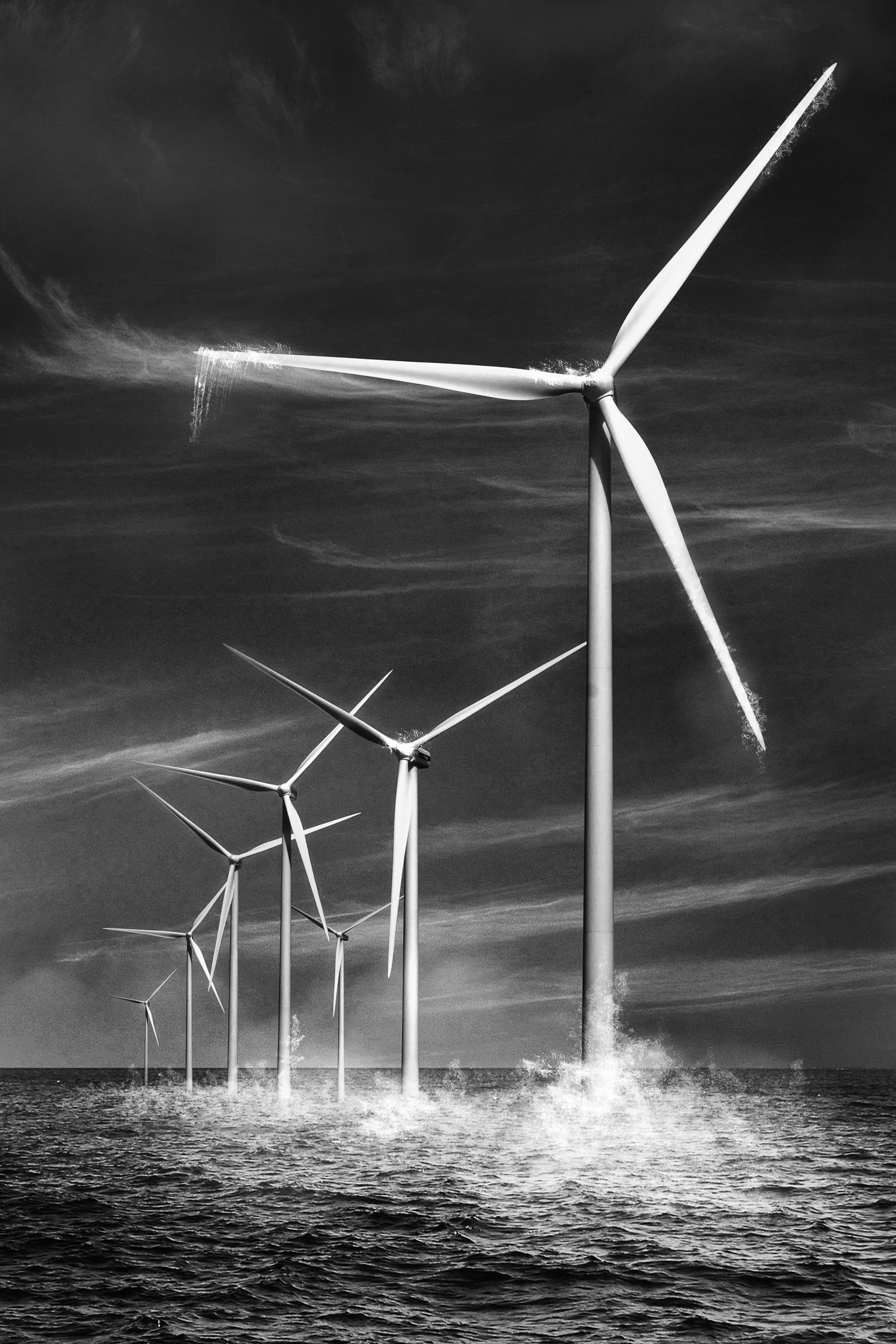 Éoliennes en mer